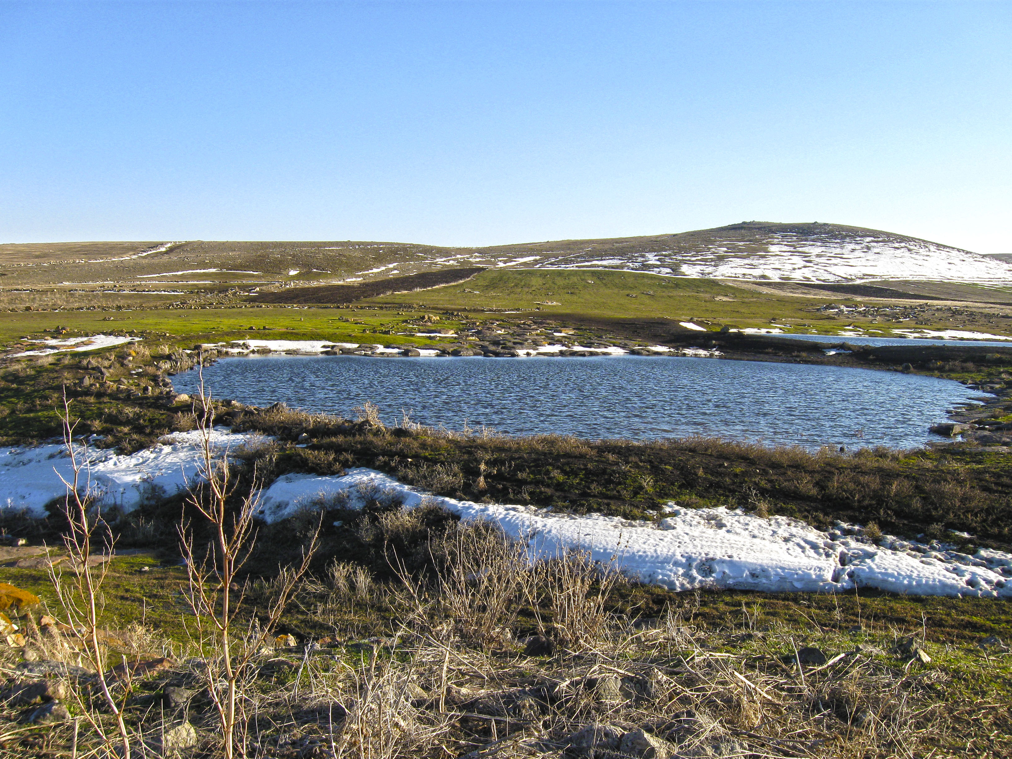 Գտնվում է Շիրակի մարզի Բարձրաշեն գյուղի տարածքում